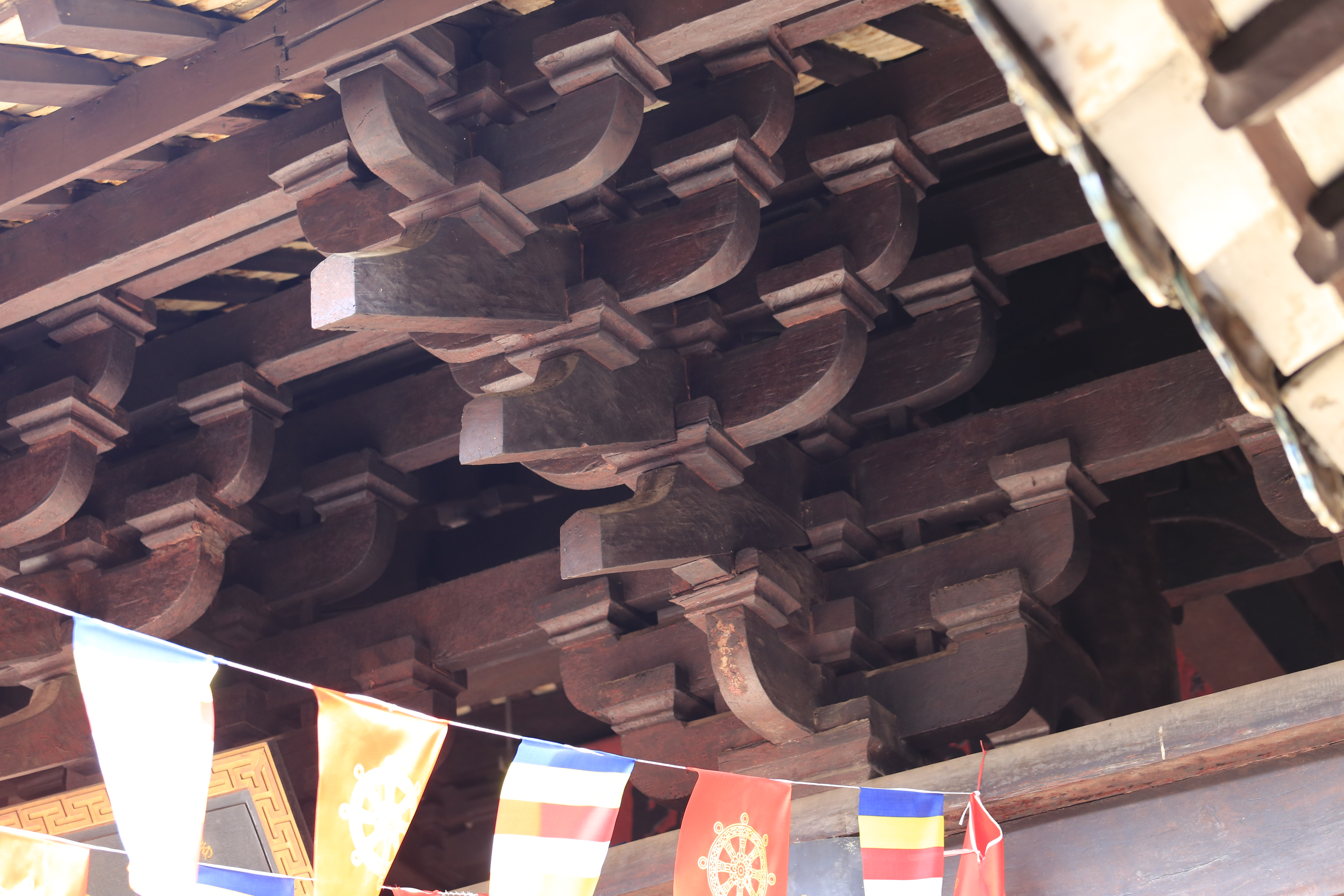 梅庵